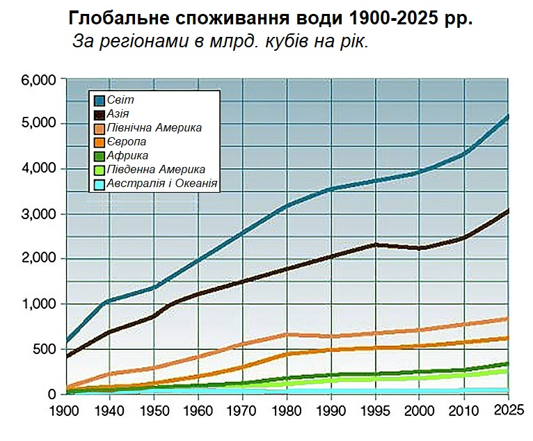 Графік споживання води в світі